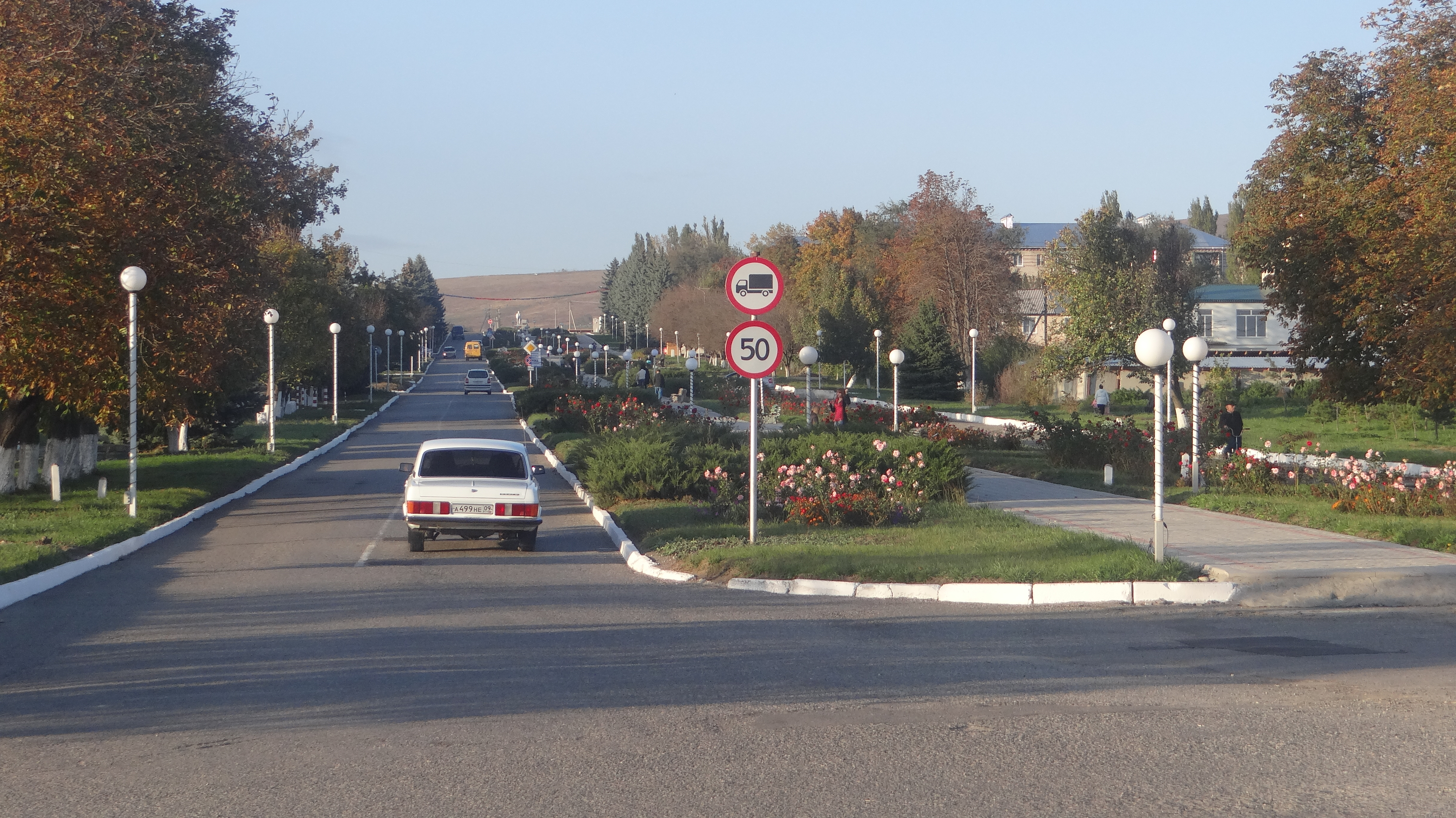 Kavkazskiy, Karachaevo-Cherkesskaya Republits, Russia, 369100